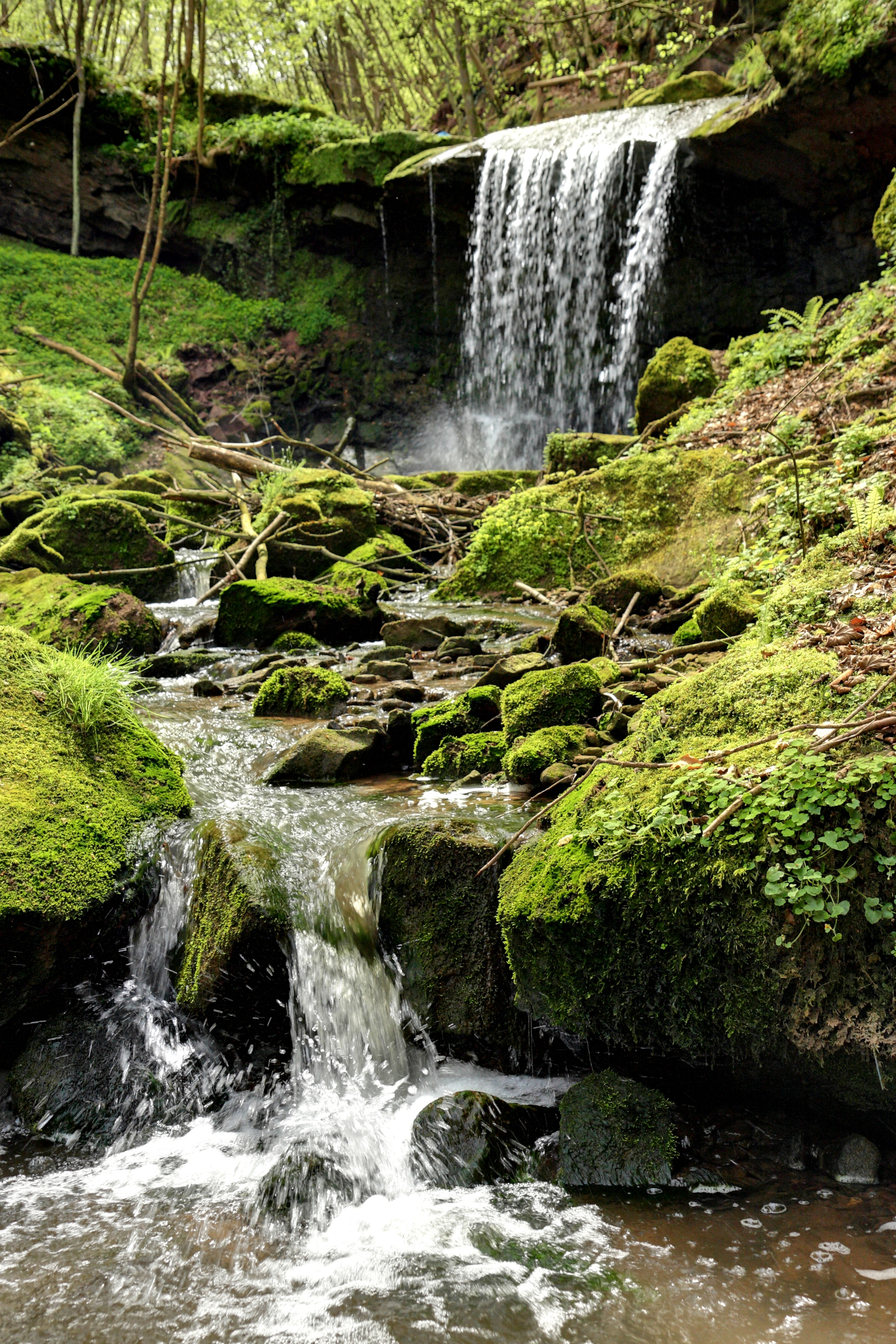 Einer der Wasserfälle des Butzerbach im geschützten Landschaftsbestandteil „Butzerbach mit beleitendem Gehölzbestand Kordel“ (LB-7235-018), abgebildeter Bereich auch im Landschaftsschutzgebiet „Meulenwald und Stadtwald Trier“; Landkreis Trier-Saarburg, Rheinland-Pfalz und im Natura 2000 Gebiet "Untere Kyll und Täler bei Kordel"